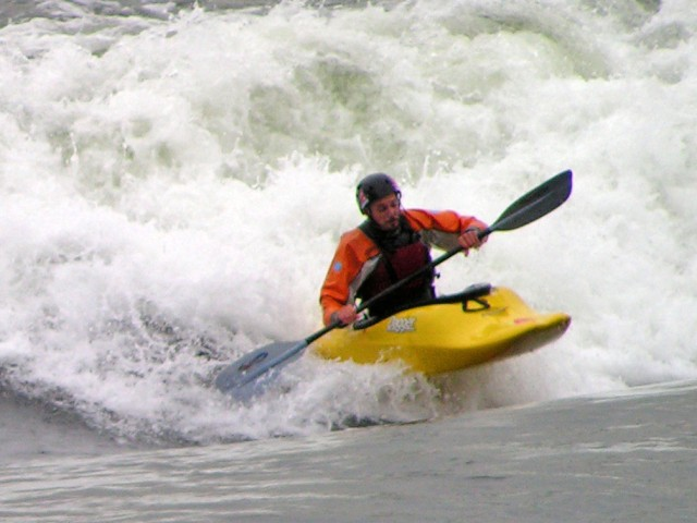 Surf sur la vague 67 à Montréal Auteur: Thierry Leveque Source: photo personnel